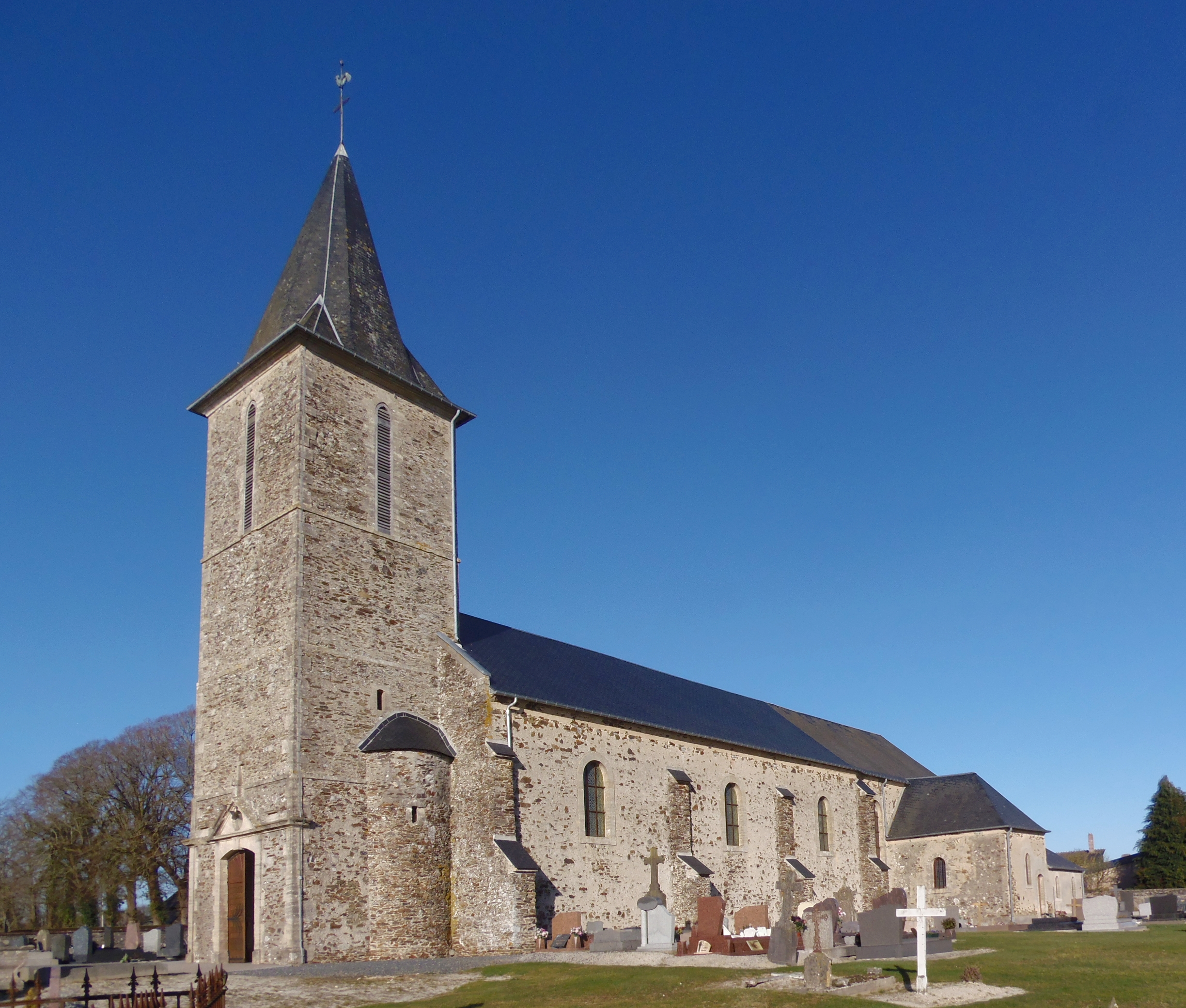 Vaubadon (Normandie, France). L'église Saint-Anne.